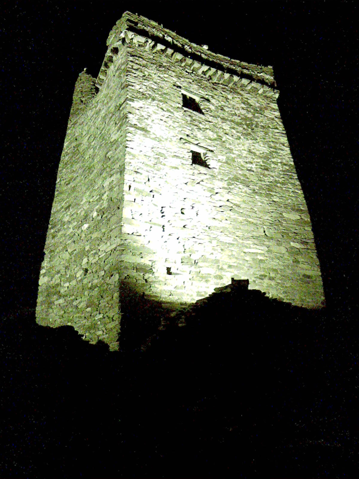 حصن زهوان الشهير